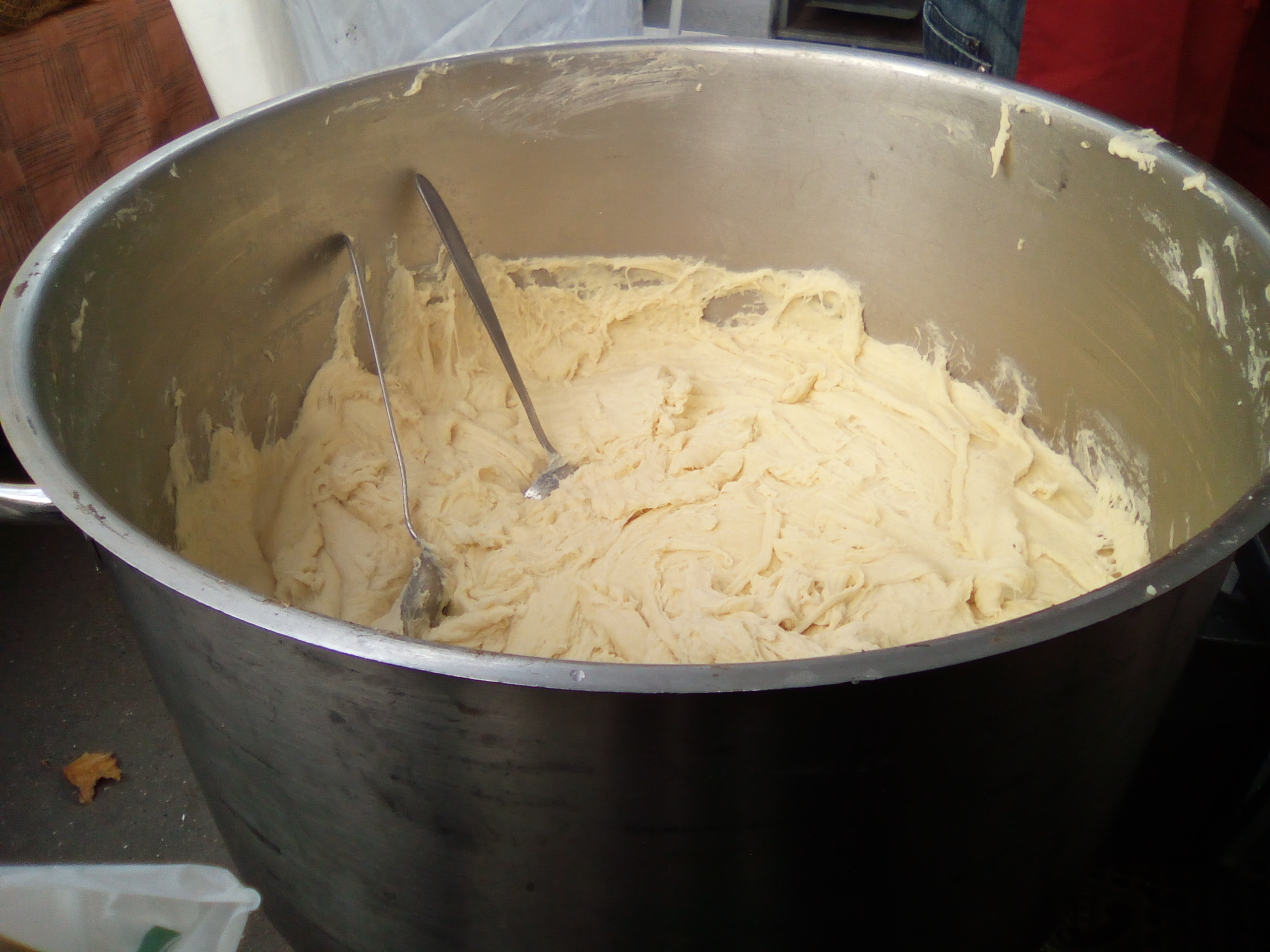 Stand du marché des Producteurs de Pays boulevard de Reuilly